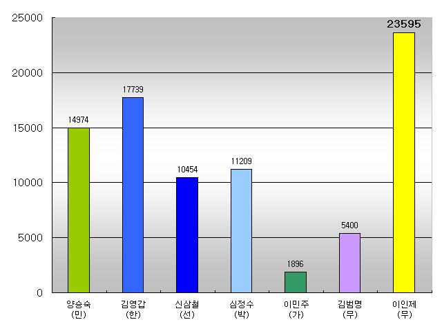 대한민국 제18대 총선 충청남도 논산·금산·계룡 지역구에서 7명의 후보가 입후보하여, 이들 중 평화통일가정당의 이민주와 무소속의 김범명을 제외한 나머지 5명이 거의 백중지세를 보이다가 결국 이인제가 당선되었다. 당시 이인제는 논산·금산·계룡 지역구에 통합민주당 후보로 공천을 신청했다가 탈락하여 탈당했으며, 자유선진당 입당설이 나돌기도 했지만 결국 무소속으로 출마를 강행했다.